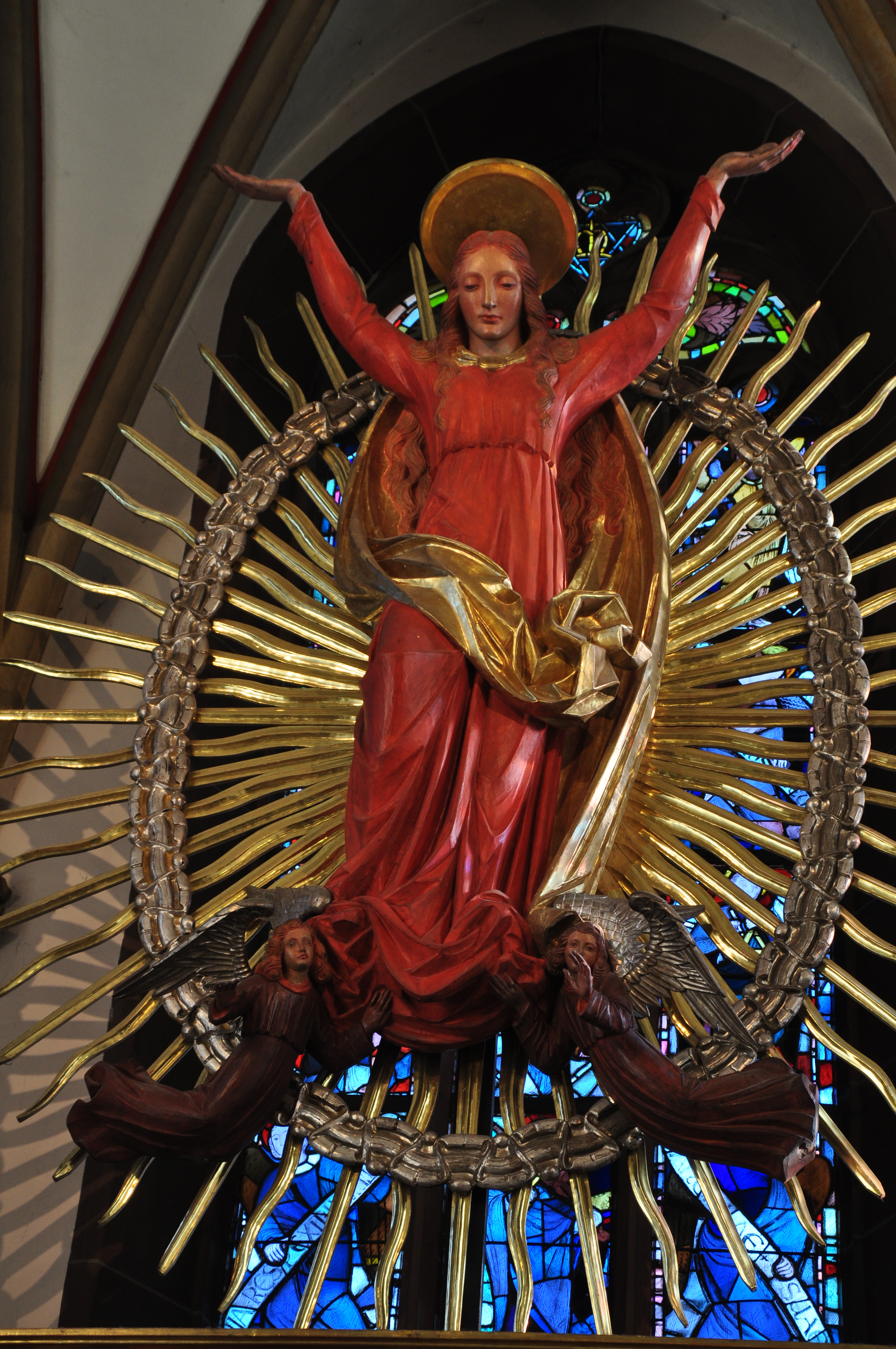 Hochaltarbild "Maria Assumpta" mit Strahlenkranz (1950), Pfarrkirche Herxheim